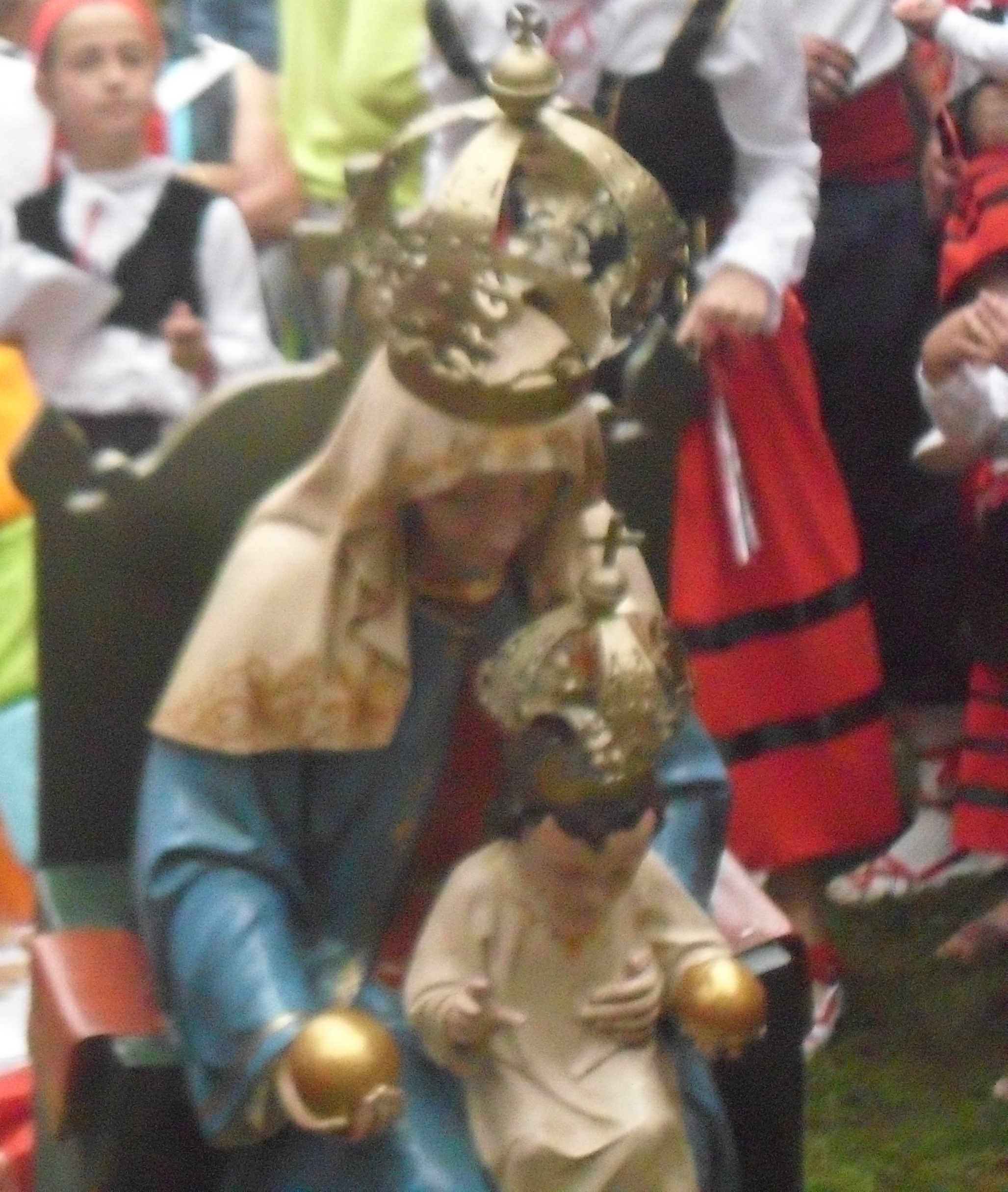 La Virgen del Llano es la patrona de los pueblos de Rioseco ,Pedreo y Obeso. Está situada en la ermita del llano en Rioseco y se la saca a ver su homenaje el 15 de Agosto.